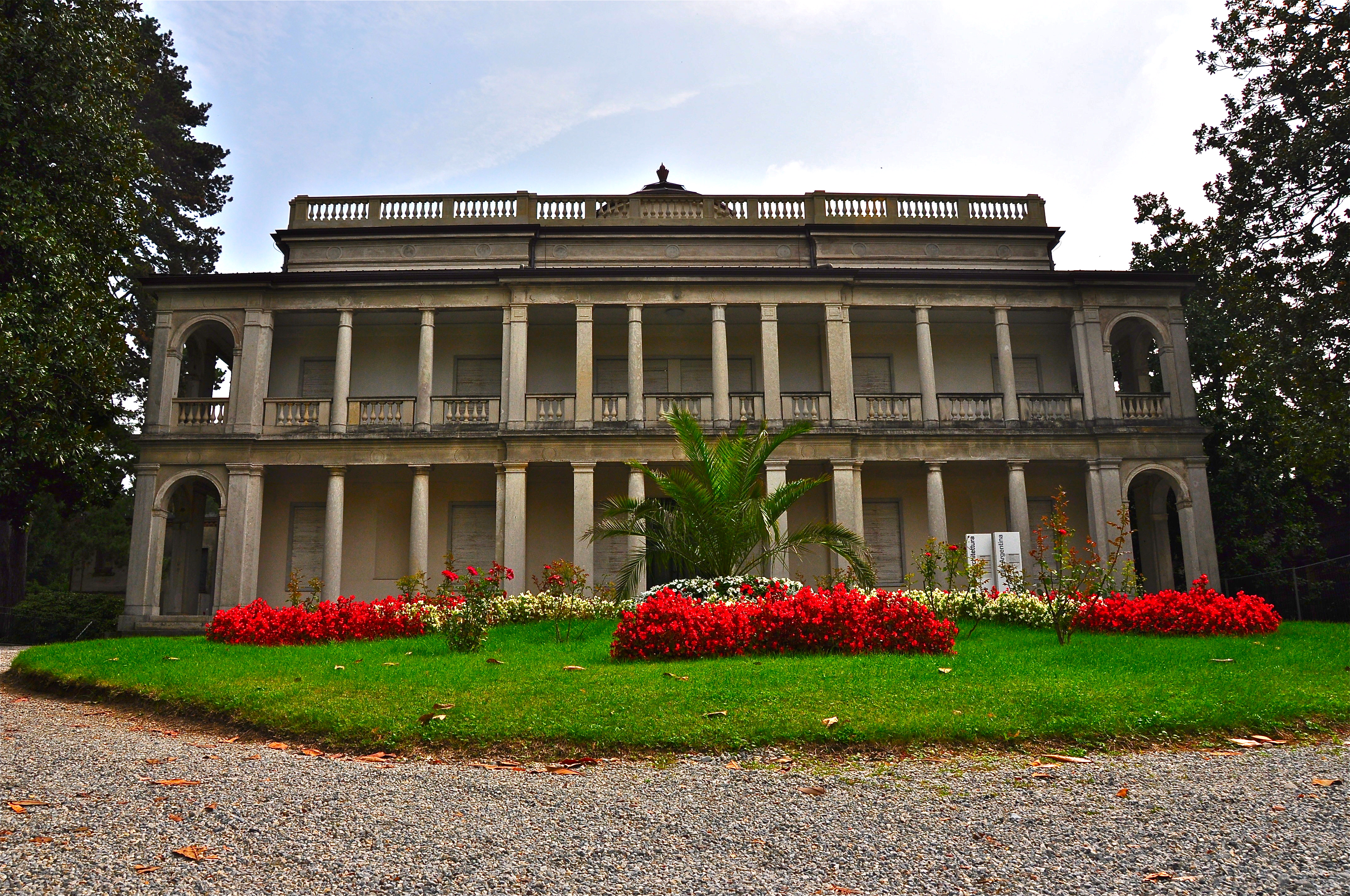 Costruita attorno 1872 per i Bernasconi che si erano arricchiti in Argentina. Oggi ospita gli uffici dell'Accademia d'Architettura - Mendrisio.